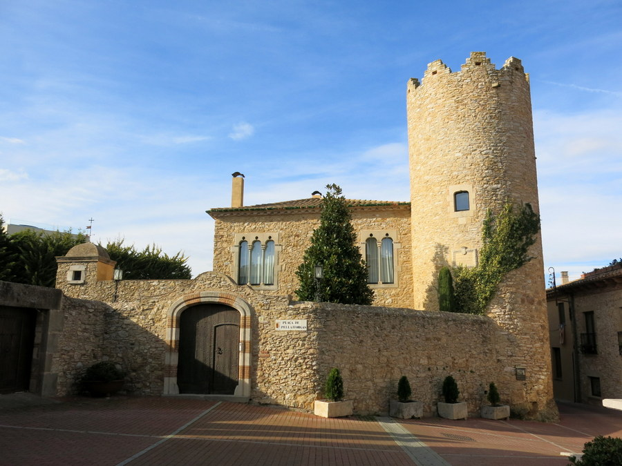 Torre Pella i Forgas de Begur - Baix Empordà - Catalunya